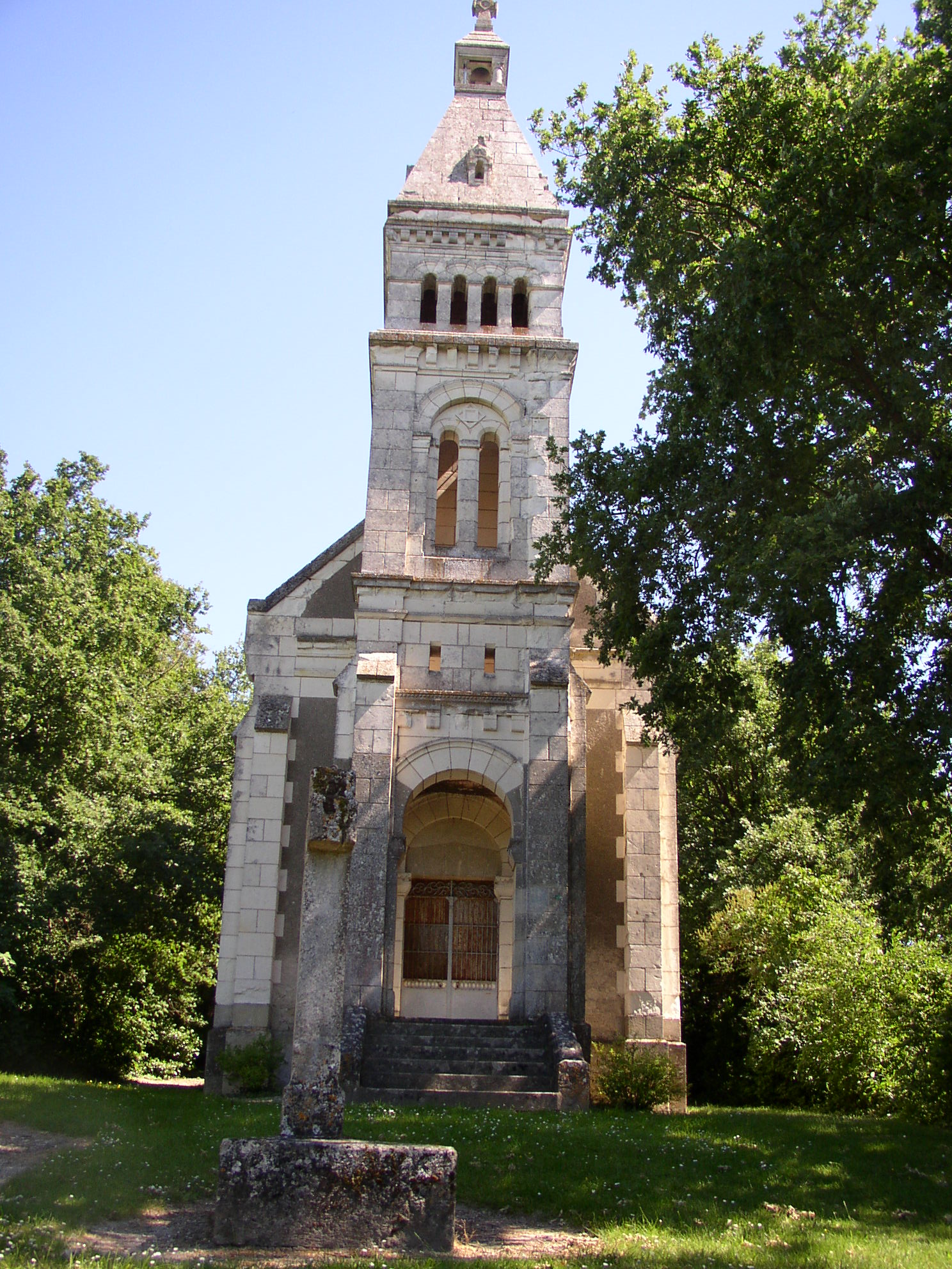 Photo chapelle des vierges